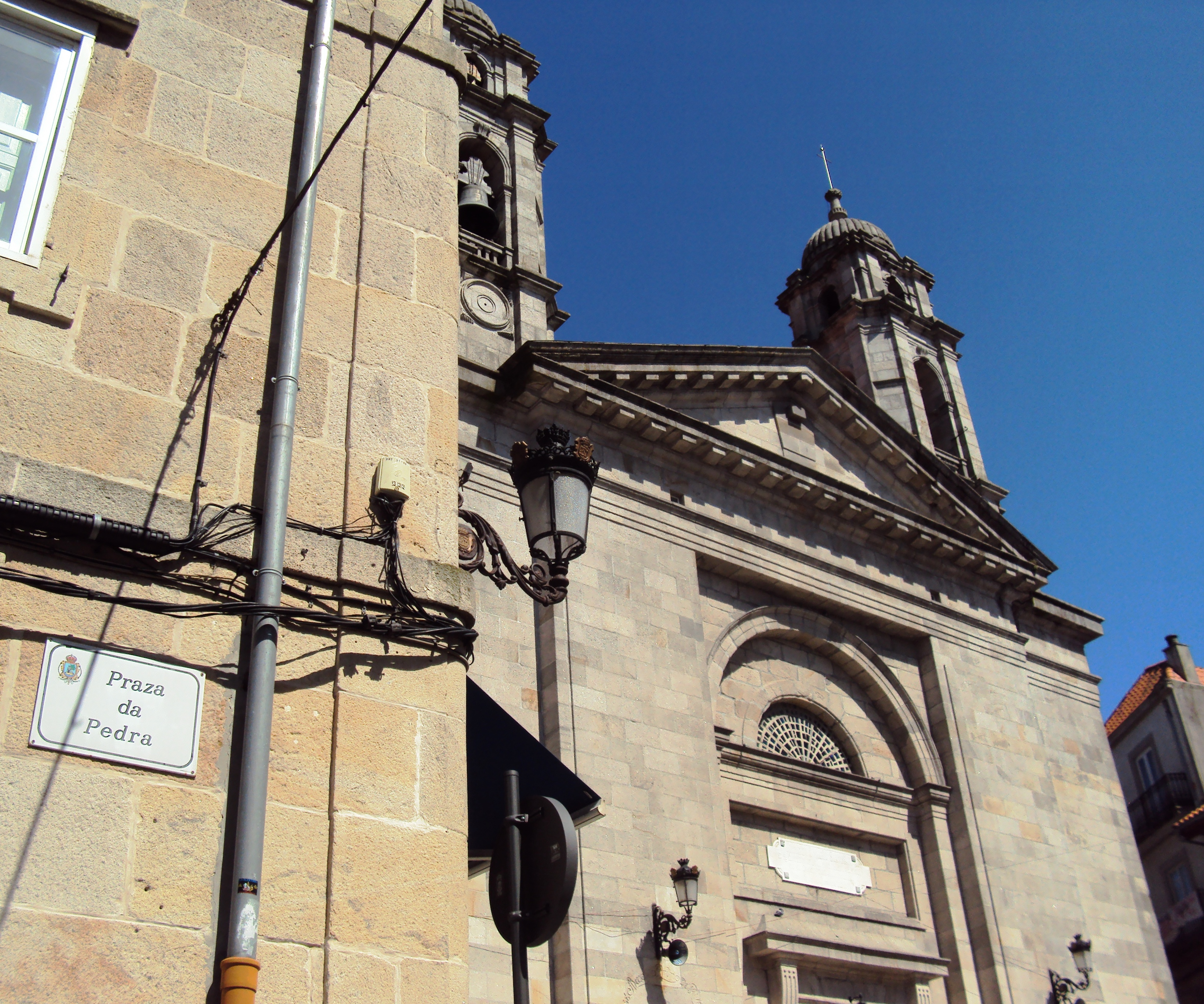 A Concatedral de Santa María de Vigo, antiga Colexiata. Iniciada en 1816 e terminada de construír en 1836, en substitución do templo gótico anterior. De estilo neoclásico, construída conforme ao proxecto do arquitecto Melchor de Prado Mariño, datado en 1811. Alberga no seu interior o soado Cristo da Vitoria que, segundo a tradición, favoreceu aos vigueses nas Guerras Napoleónicas. Cada primeiro domingo de agosto sae en procesión dentro da maior manifestación relixiosa da cidade.